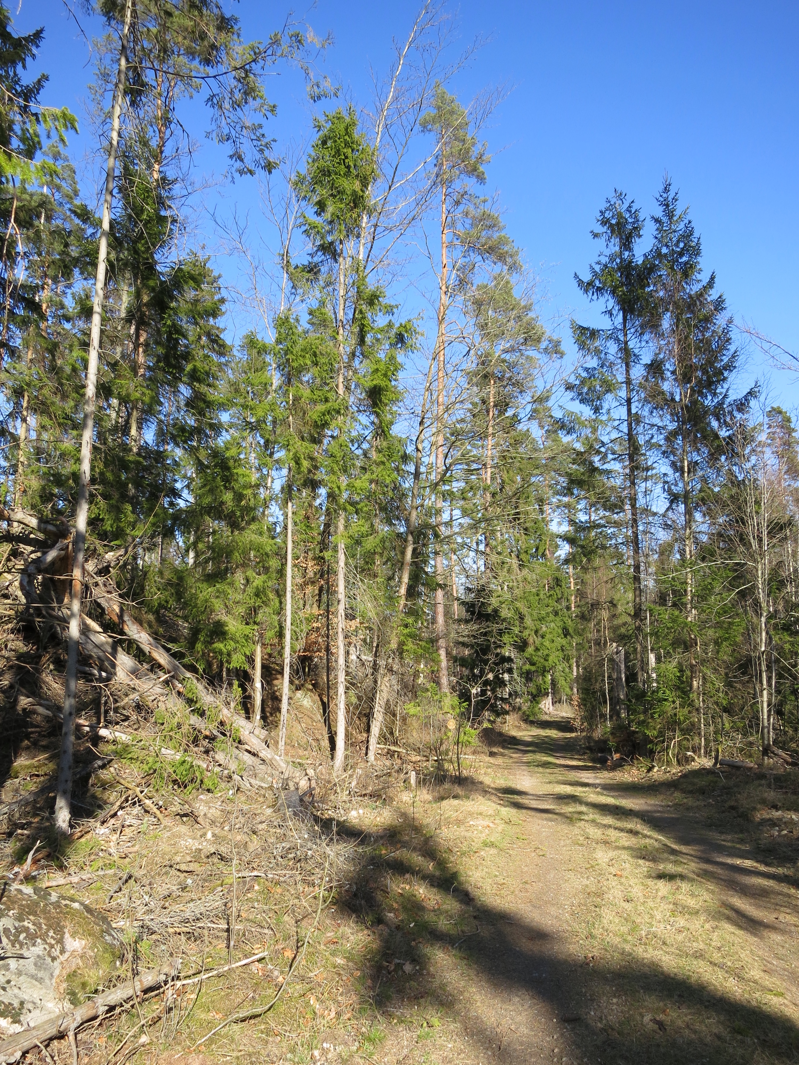 Nytebodaskogen